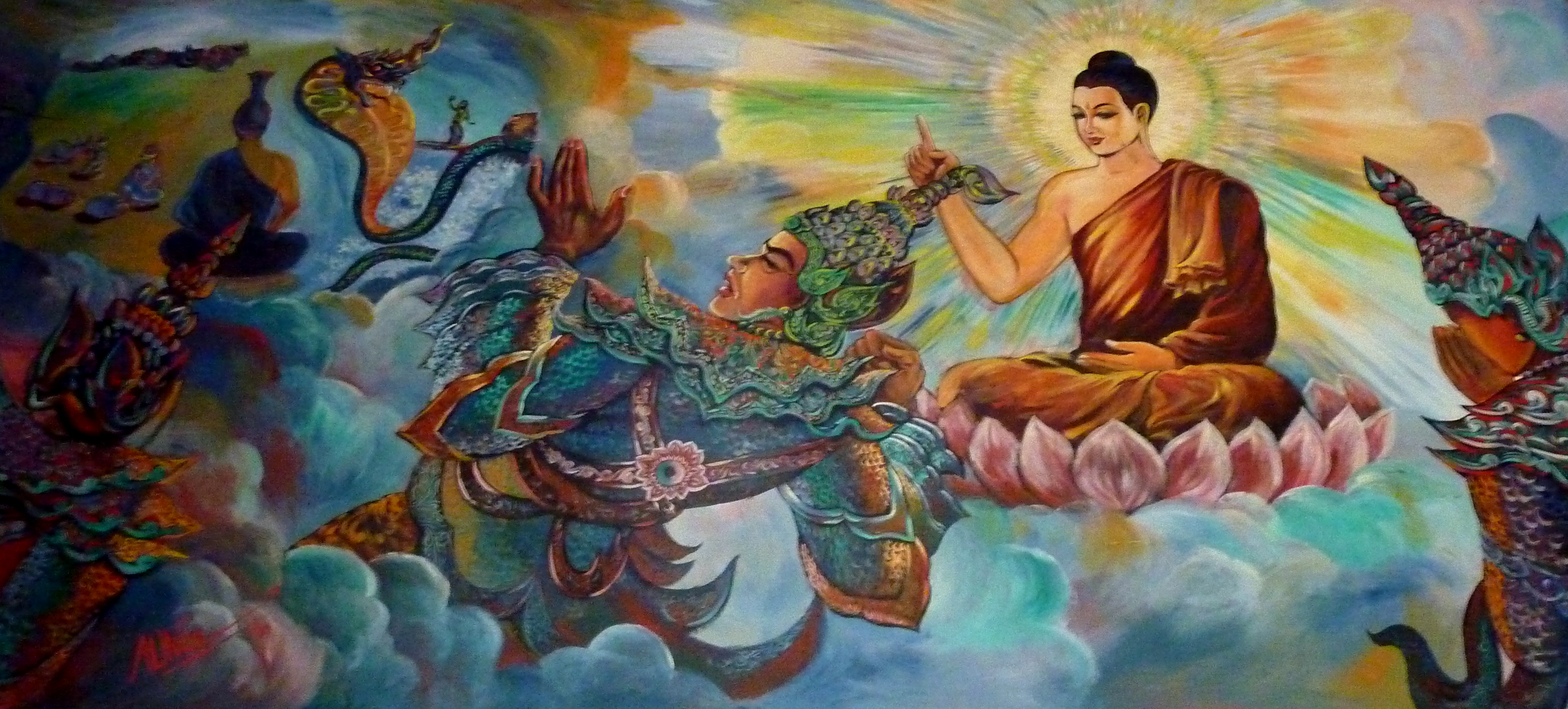 077 The Defeat of Baka, at Wat Olak Madu, Kedah